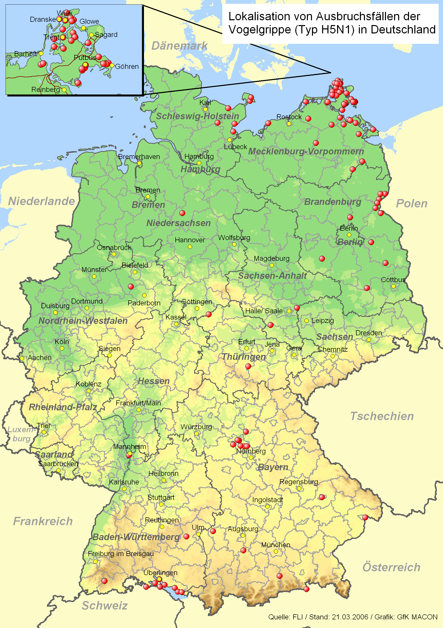 Lokalisation von Ausbruchsfällen der Vogelgrippe in Deutschland Stand: 21.03.06 Grafik: GfK MACON